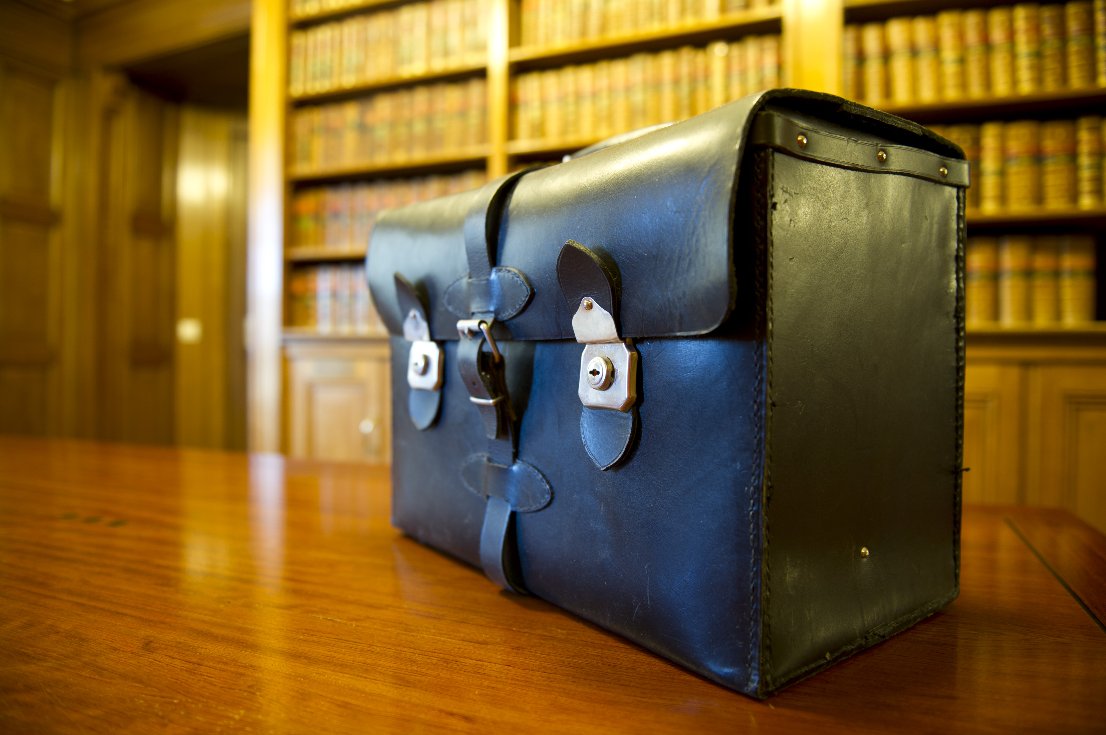 Ministers en staatssecretarissen krijgen van hun ambtenaren geregeld stukken mee voor het weekend. Denk hierbij aan rapporten, beleidsstukken, etc. die gelezen en beoordeeld moeten worden door de bewindspersoon. Veelal gaat dit om grote hoeveelheden en moeten er dus dit soort ‘loodgieterstassen’ aan te pas komen.